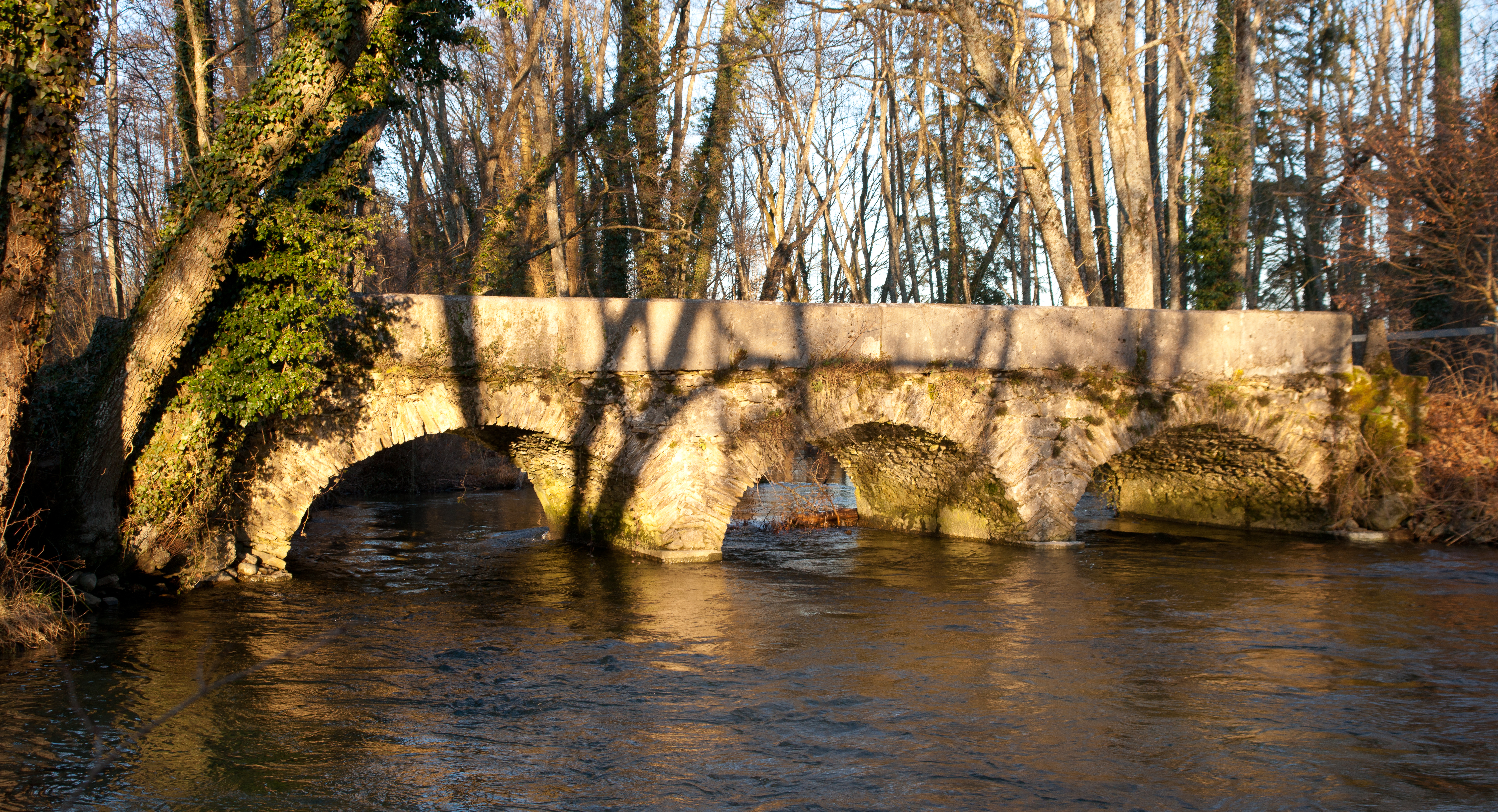 Le Pont de Grilly à la frontière entre la France (Ain) et la Suisse (canton de Vaud).